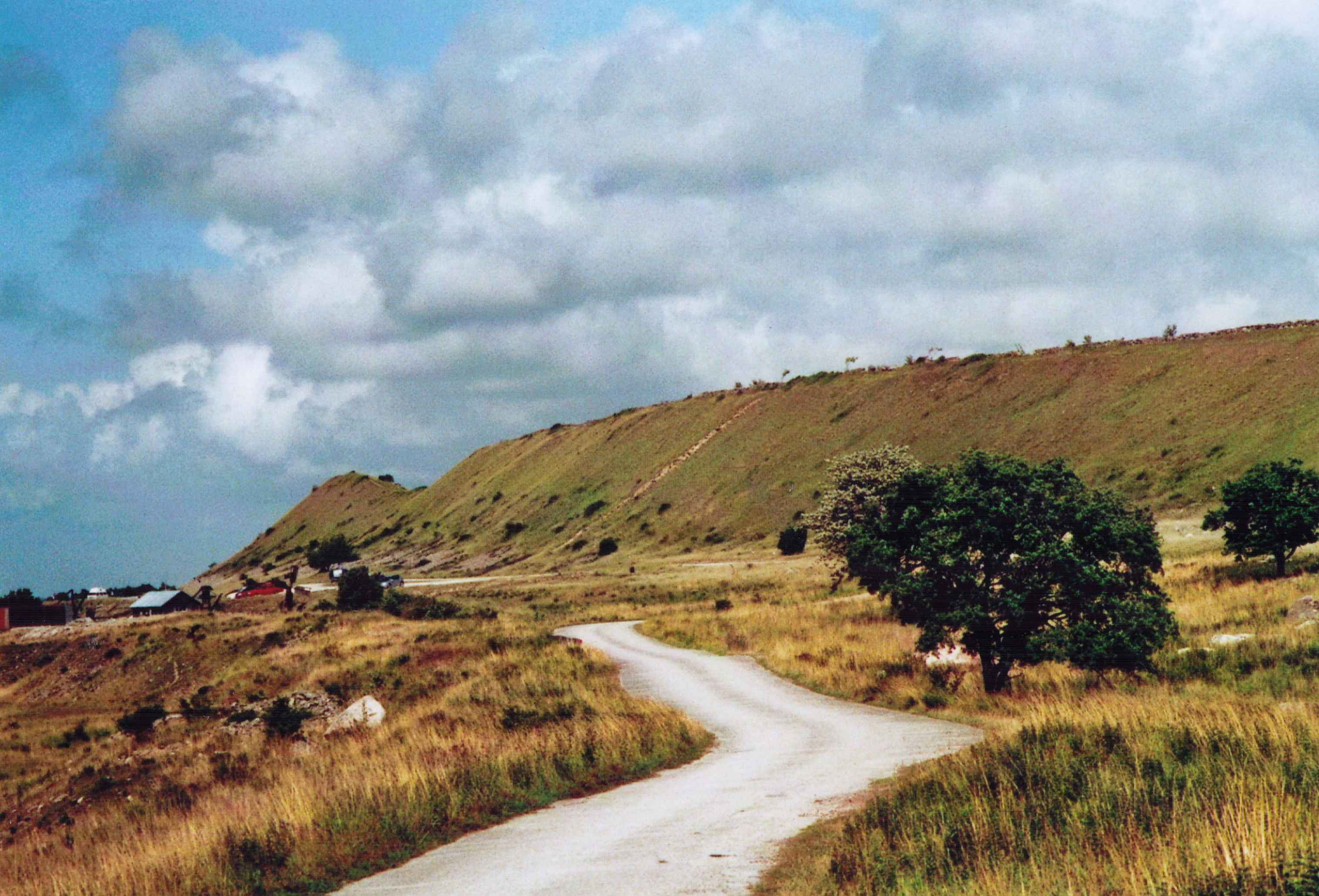 Hoburgen im Süden Gotlands: Küstenstraße nördlich von Hoburgen